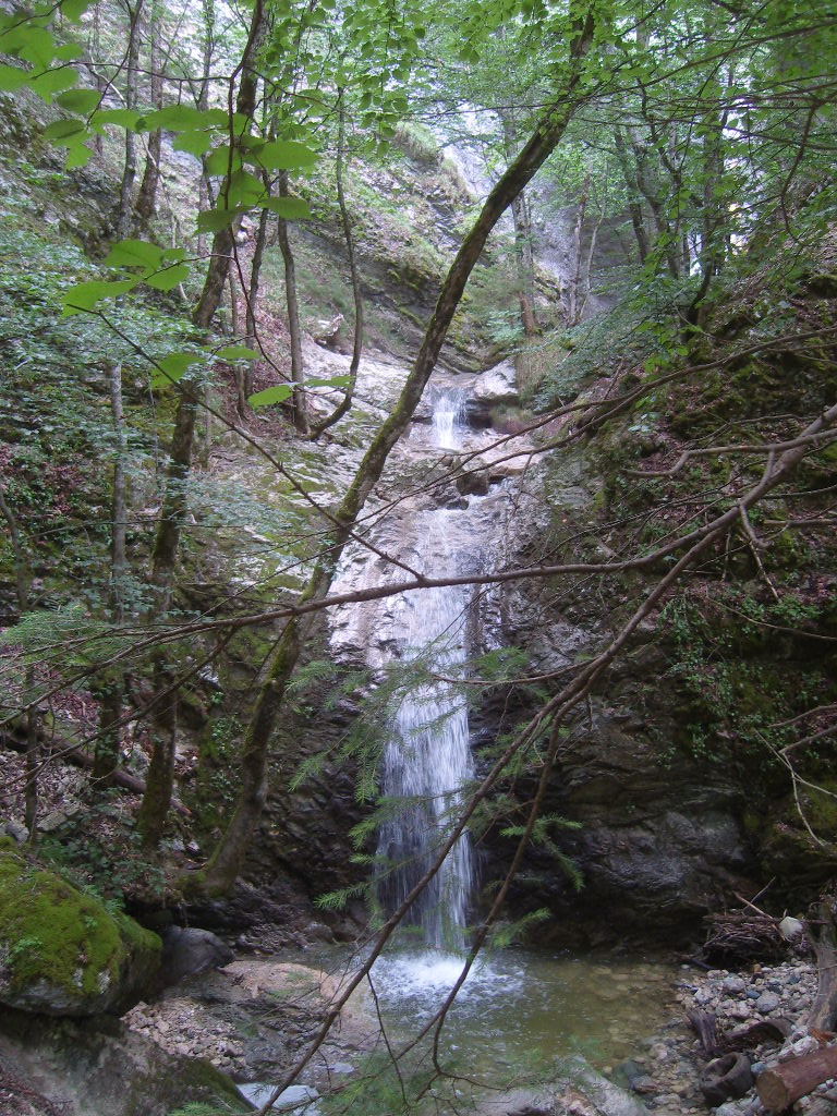 Gorges de Covatanne, entre Sainte-Croix et Vuitebœuf, canton de Vaud, Suisse